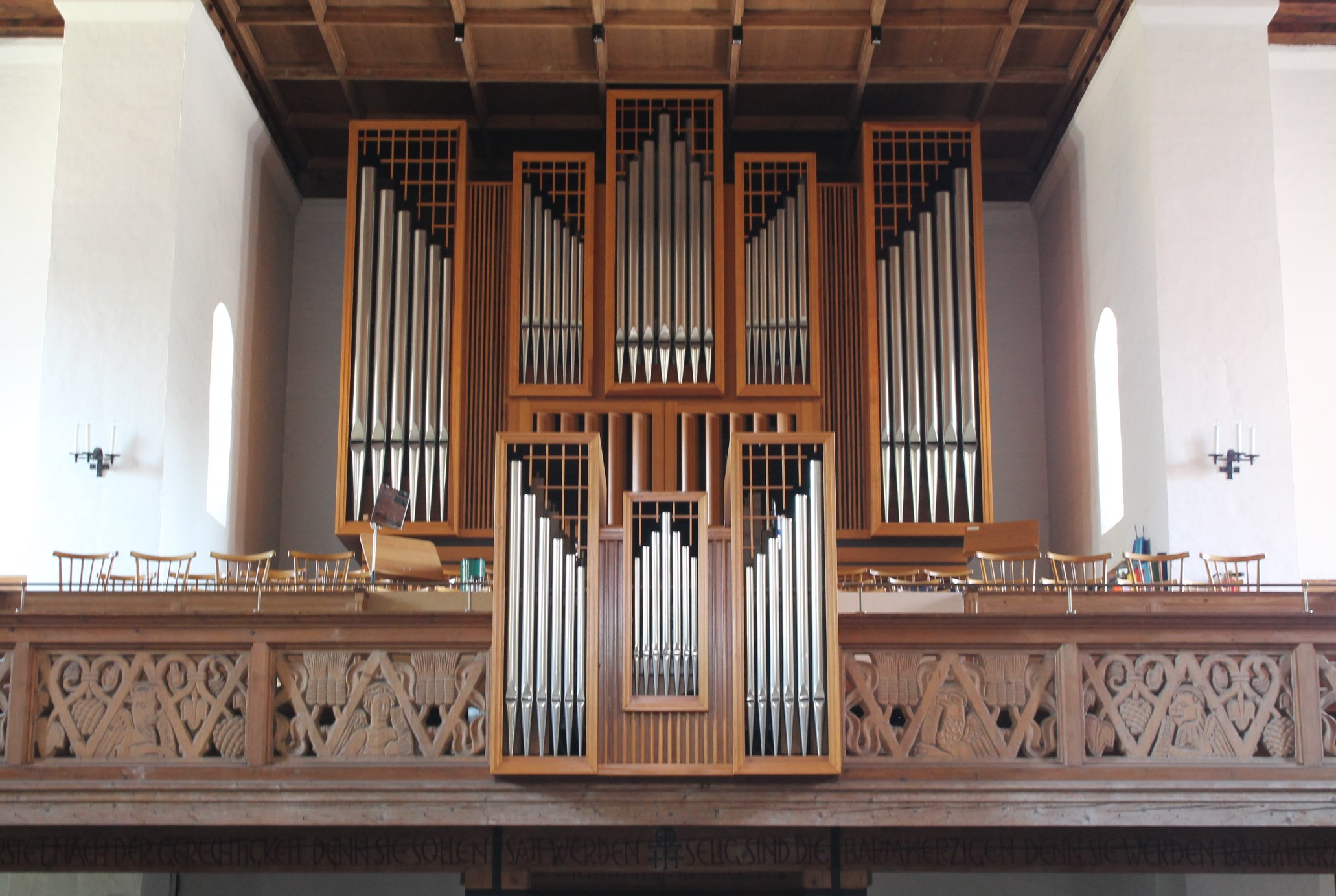 Orgel der Stephanuskirche in München (1969, D. Kleuker, III/36; 2003 Umbau von C. Kaps auf III/40)